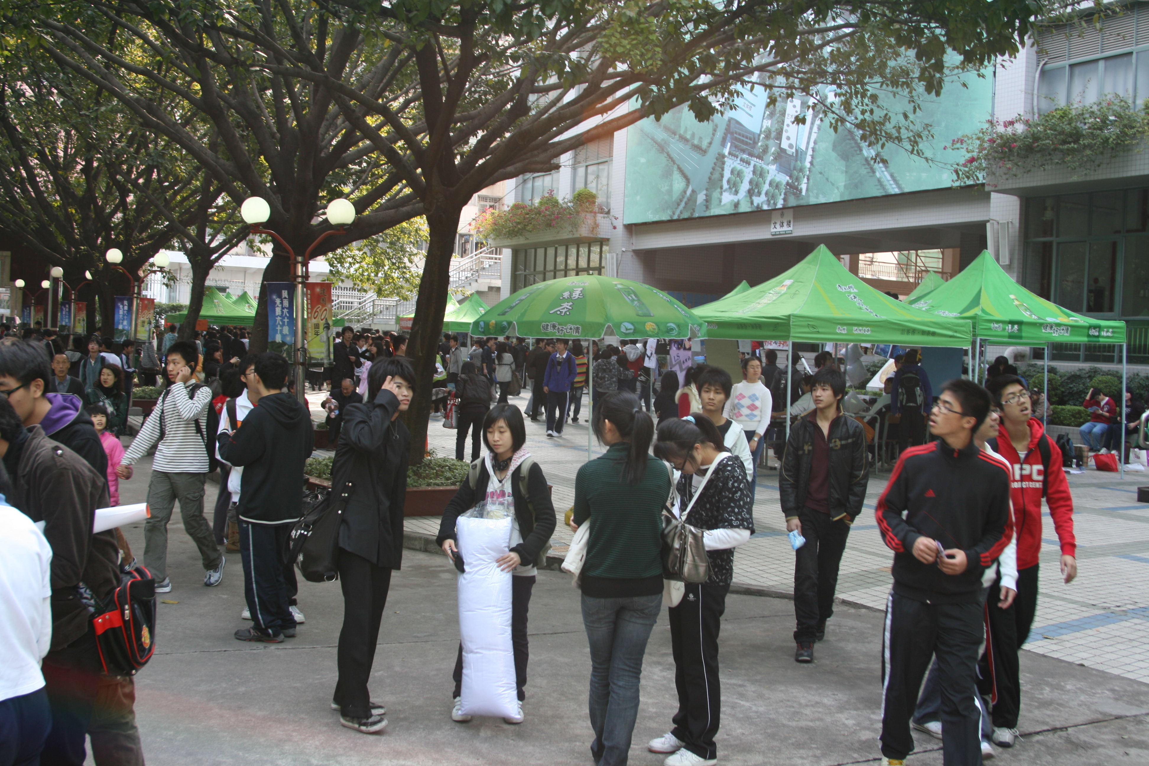 2010年1月1日深圳中学游园会